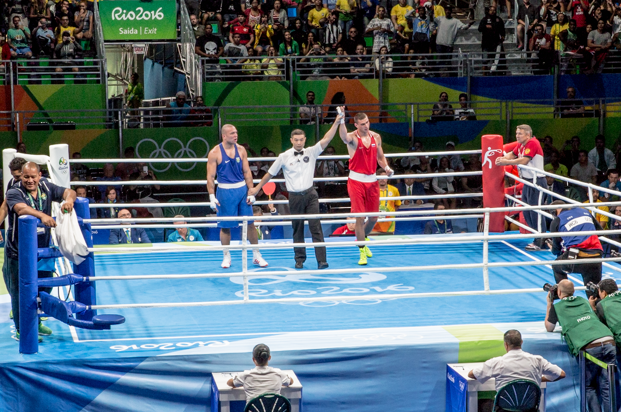 Day 3